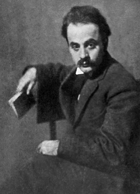 Kahlil Gibran, Photograph, Al-Funoon, 1, No. 1 (April 1913)